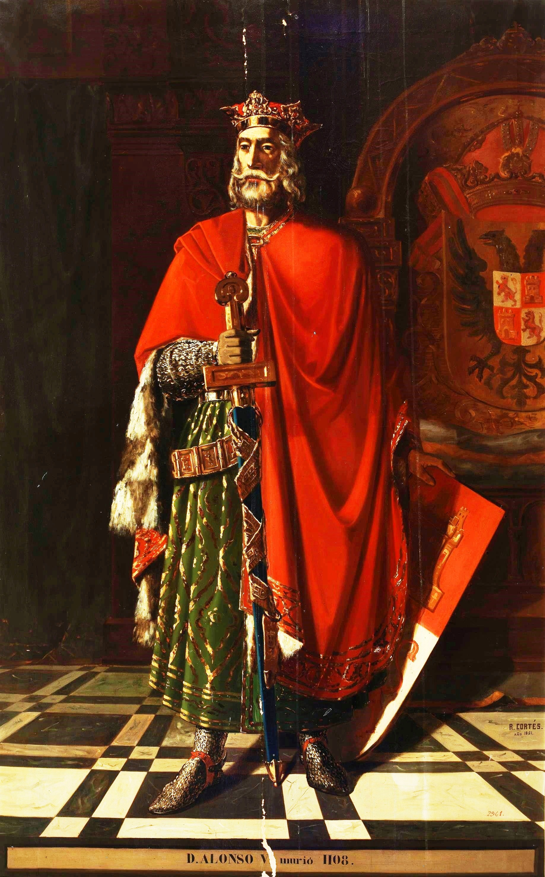 Retrato imaginario del rey Alfonso VI de León (1047-1109). Fue hijo del rey Fernando I de León y de la reina Sancha de León. Conquistó la ciudad de Toledo en el año 1085, aunque fue derrotado por los musulmanes en las batallas de Sagrajas y Uclés, que constituyeron sendas derrotas para las tropas leonesas y castellanas, falleciendo en la primera de ellas el heredero de Alfonso VI, el infante Sancho Alfónsez. Alfonso VI falleció en 1109, a los 62 años de edad y fue sucedido por su hija, Urraca I de León.